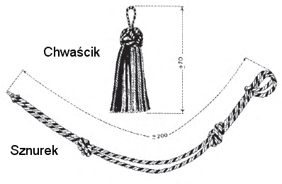 Ozdoby rogatywki żołnierzy ON wz.1938